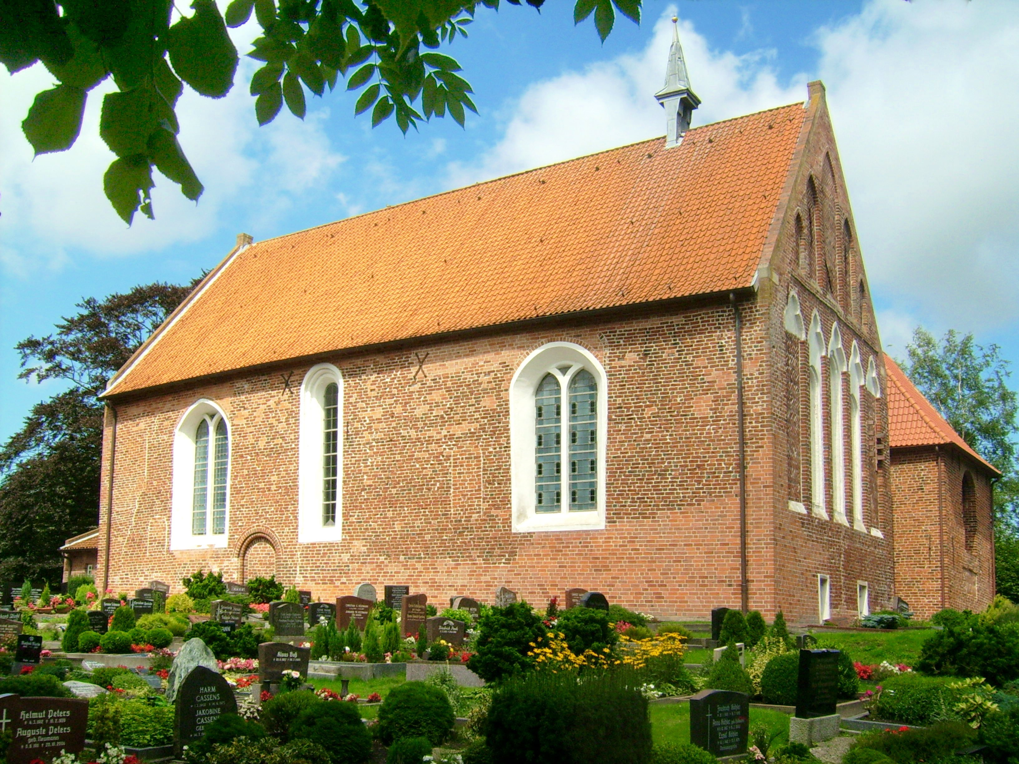 Bartholomäuskirche in Dornum